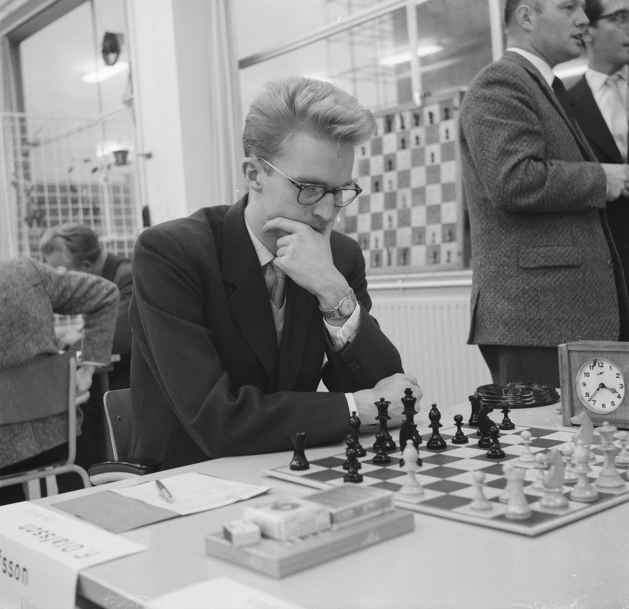 Collectie / Archief : Fotocollectie Anefo Reportage / Serie : [ onbekend ] Beschrijving : Zone-schaaktoernooi te Berg en Dal , Olafsson Datum : 1 december 1960 Locatie : Berg en Dal Trefwoorden : schaaktoernooien Persoonsnaam : Olafsson, Fridrik Fotograaf : Rossem, Wim van / Anefo Auteursrechthebbende : Nationaal Archief Materiaalsoort : Negatief (zwart/wit) Nummer archiefinventaris : bekijk toegang 2.24.01.03 Bestanddeelnummer : 911-8324